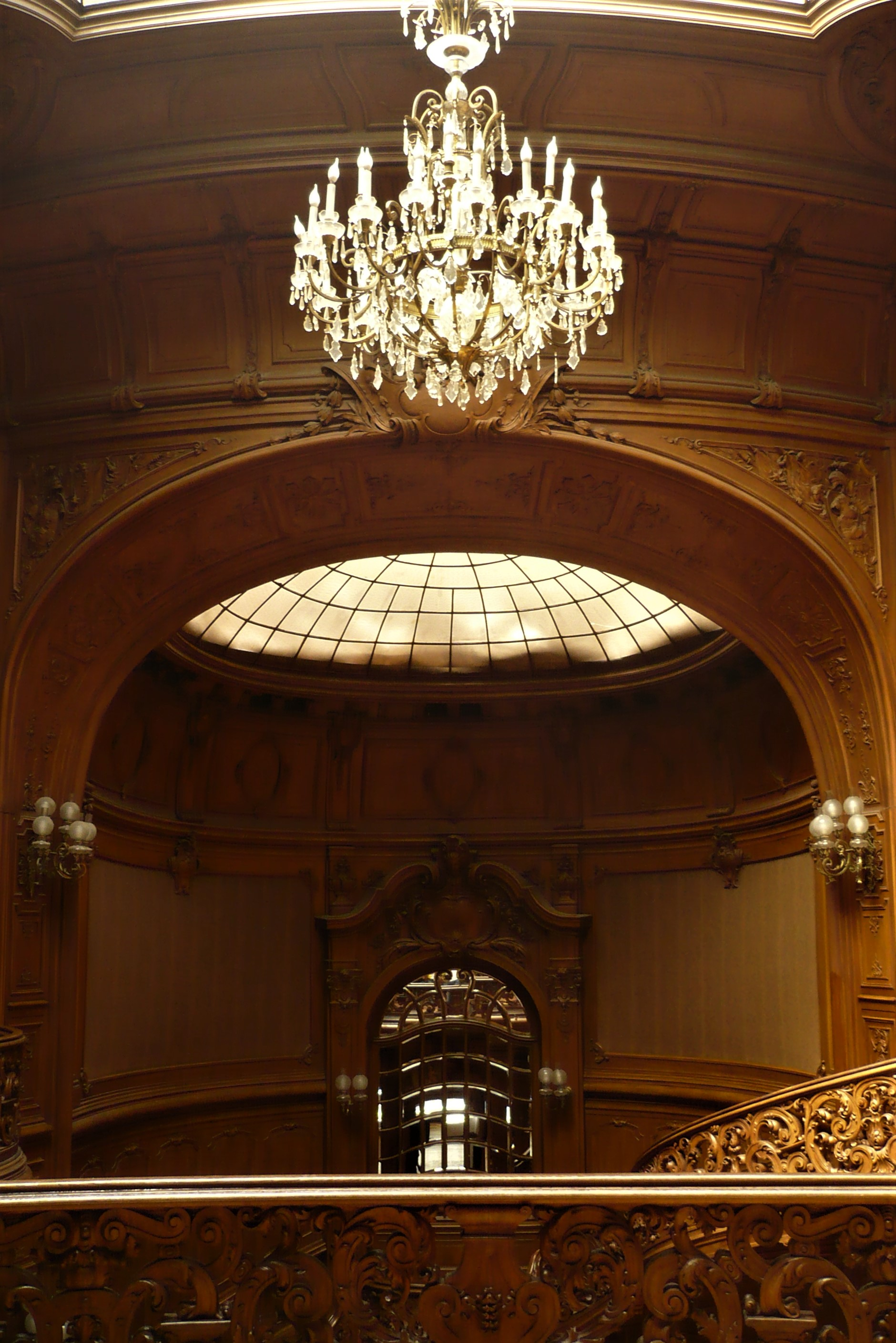 Kasyno Szlacheckie we Lwowie